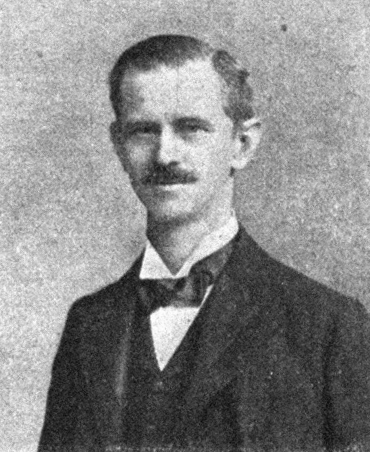 Österreichischer Politiker, Reichsratswahl 1907, Name siehe Dateiname